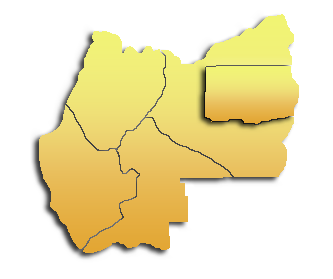 Mapa del municipio de Cotoca, perteneciente a la provincia de Andrez Ibánez,Bolivia